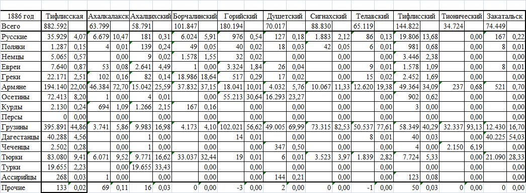 Сводные данные посемейных списков Кавказа за 1886 год